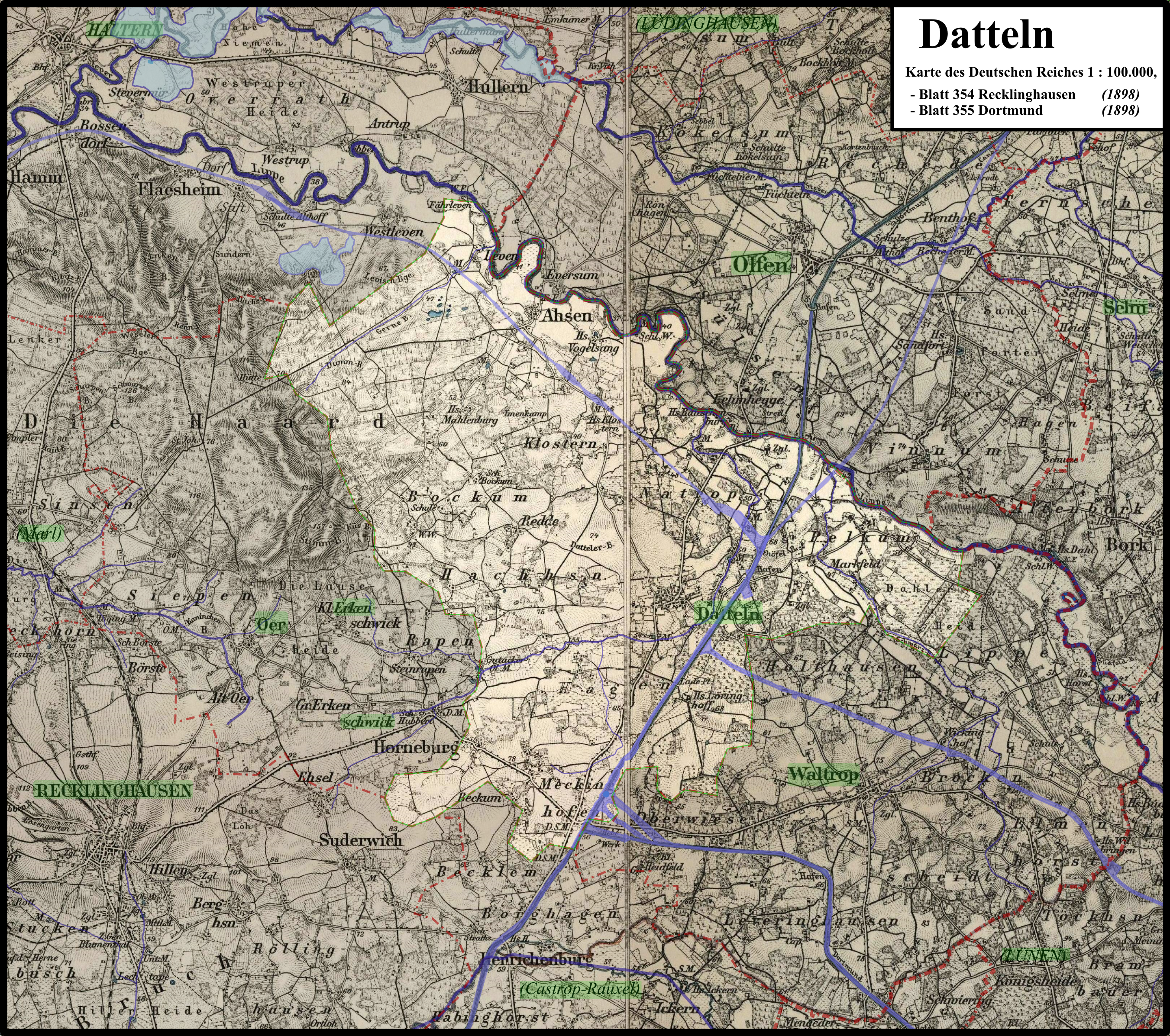 Karte der Stadt Datteln auf Basis der Karte des Deutschen Reiches| 1 : 100.000, Ende des 19. Jahrhunderts;Verwaltungsgrenzen (rot), Kanäle, Flüsse und Seen entsprechen dem heutigen Stand/Verlauf; heutige Stadtnamen sind hellgrün hervorgehoben (damalige Stadtnamen in Großbuchstaben), aufgehellt und hellgrün umgrenzt ist die heutige Stadt Datteln.